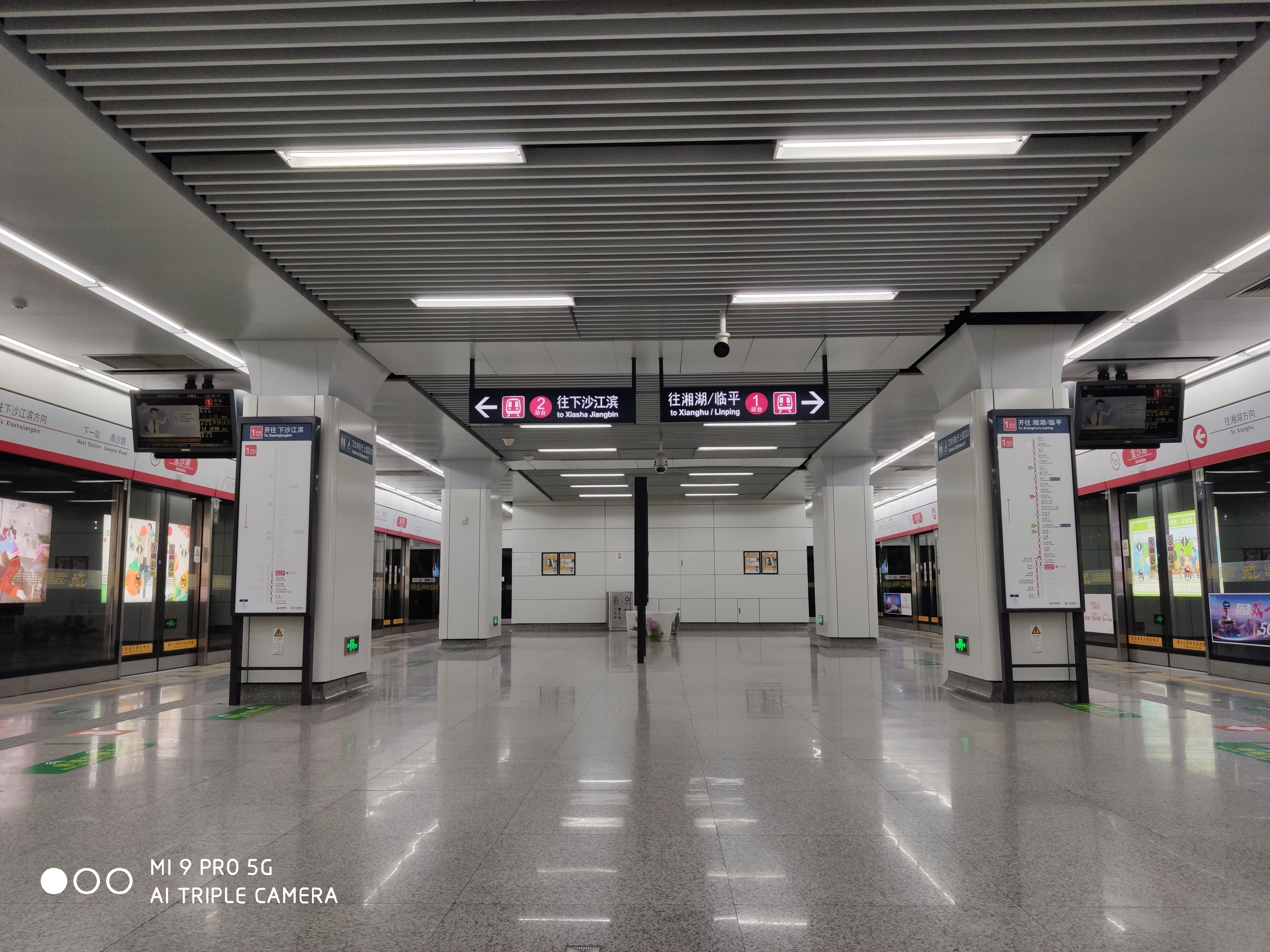 中文（中国大陆）: 站台的西侧，右边为湘湖方向，左边为下沙江滨方向。拍摄于2020-02-14。